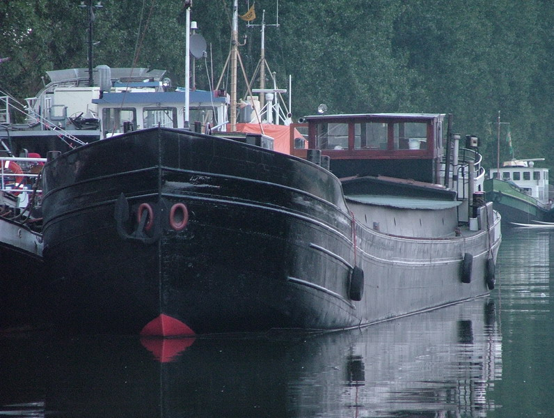 Foto van het motorschip Watergeus te Sluiskil.